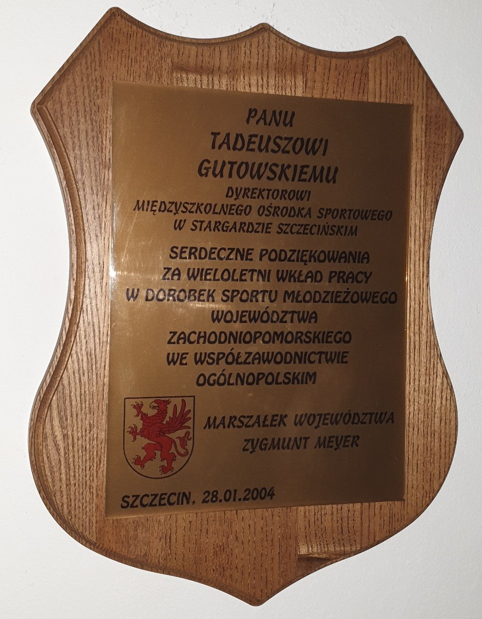 WyróżnienieTadeusz Gutowski